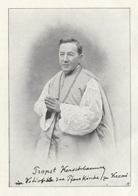 Anton Kerschbaumer (1823-1909) kath. Priester, Buchautor, Landtagsabgeordneter